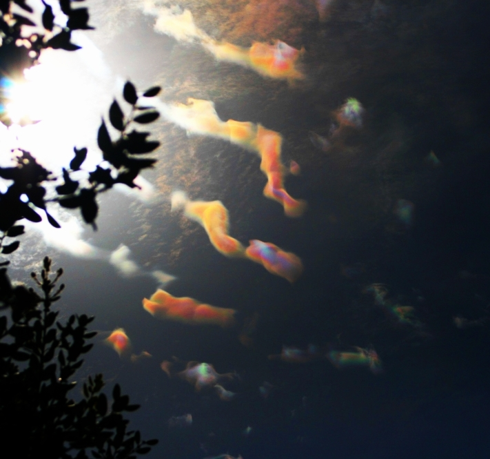 Iridescent clouds